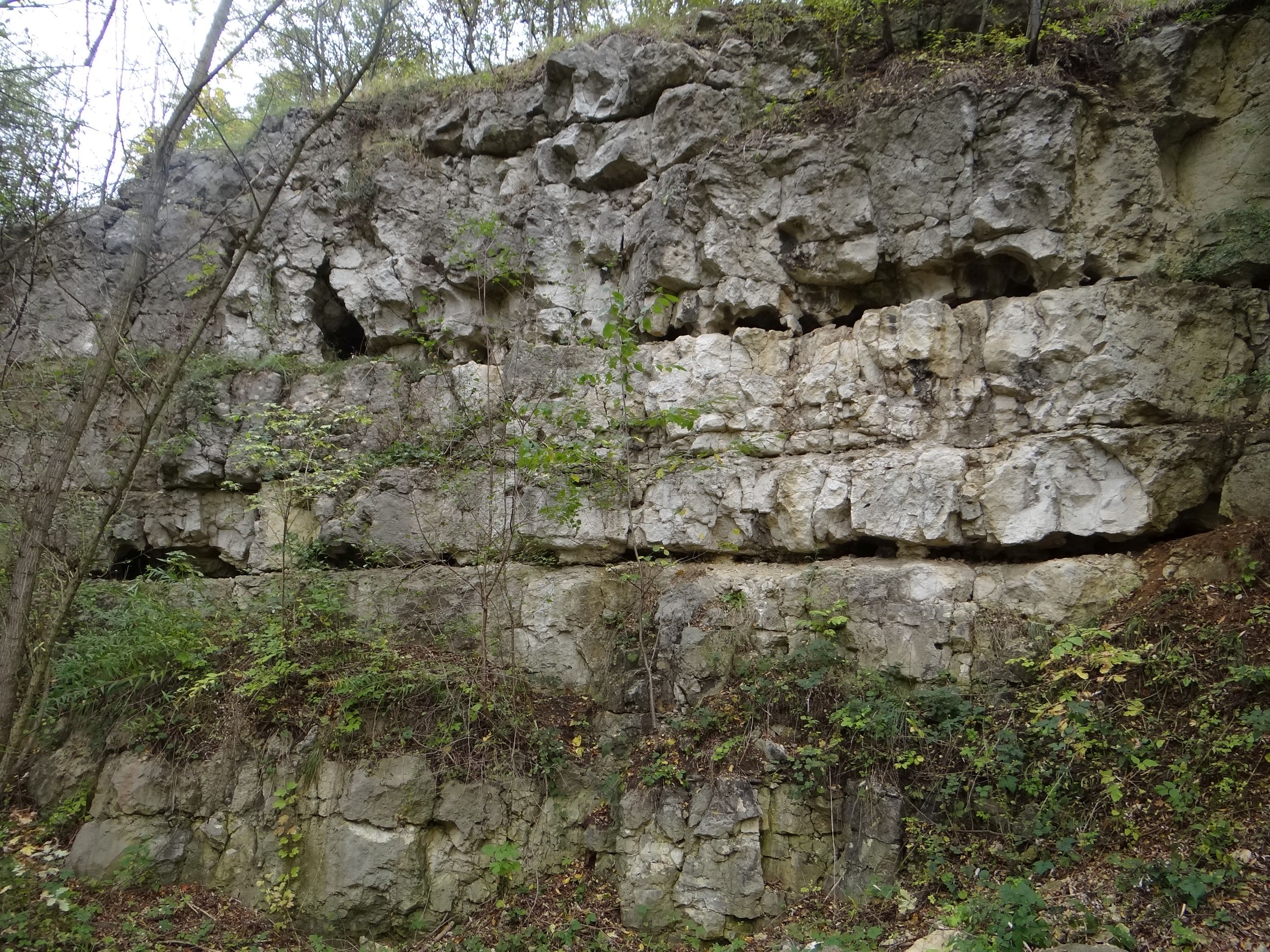 Jaskinia w Anastomozach na Zakrzówku w Krakowie